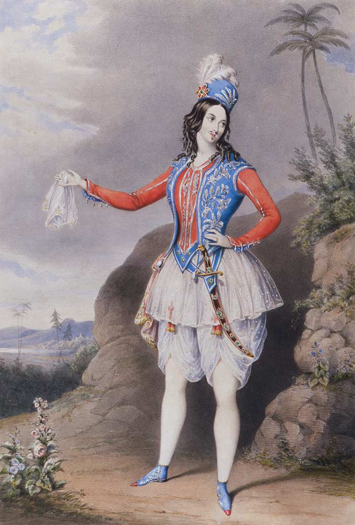 Sarah Louisa Fairbrother as Abdullah in Open Sesame, staged in 1844